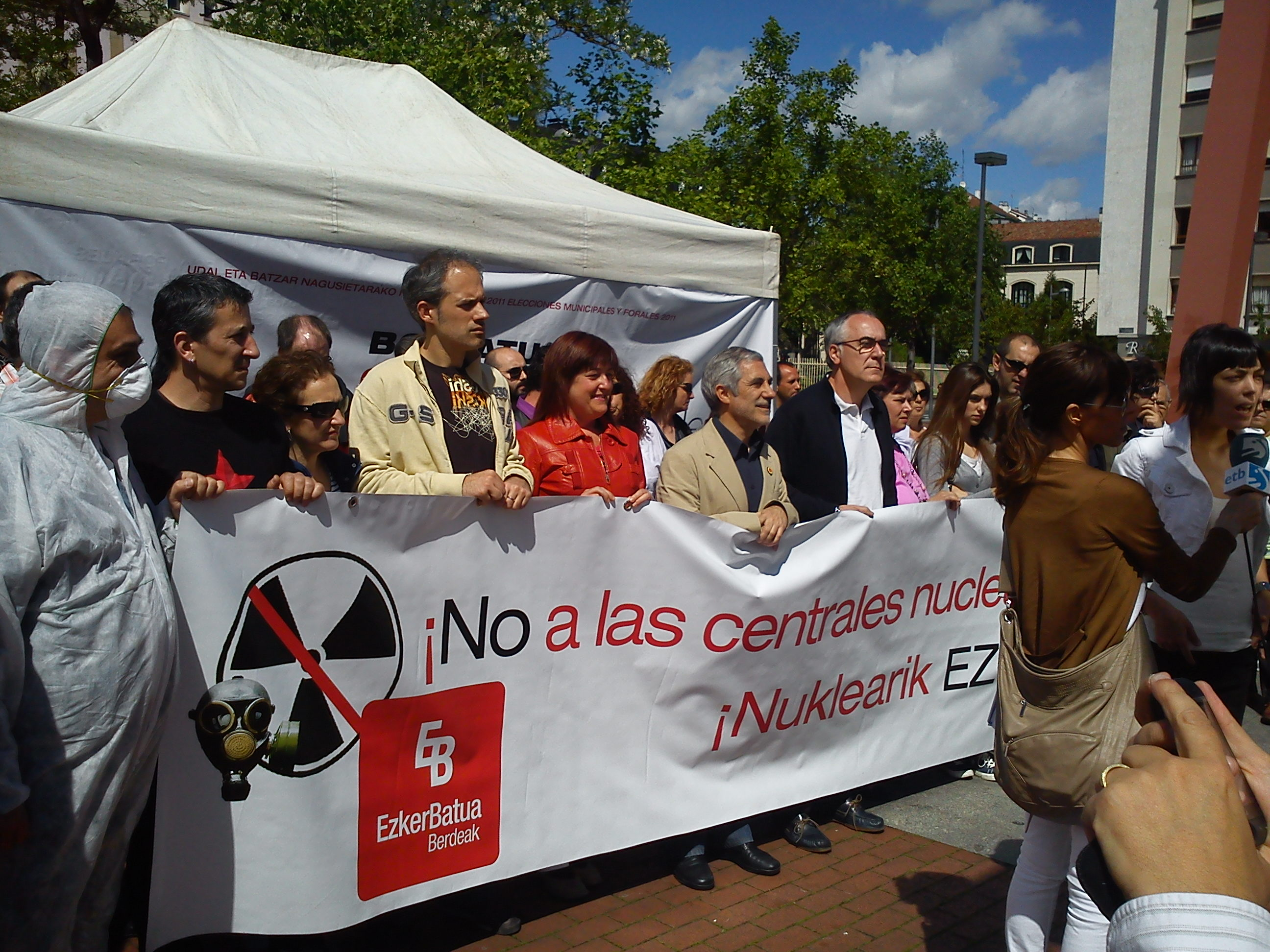 Acto de Ezker Batua contra las centrales nucleares (8 de mayo de 2011, Vitoria). En el centro, Gaspar Llamazares. A su izquierda, José Navas, candidato a la alcaldía de Vitoria. A su derecha, Nerea Gálvez, candidata a Diputada General de Alava